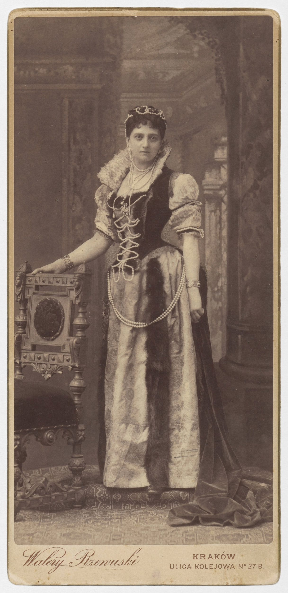 Helena Sanguszkówna w roli księżnej Gryzeldy Wiśniowieckiej w żywych obrazach z "Ogniem i mieczem" Henryka Sienkiewicza. Żywe obrazy z "Ogniem i mieczem" Henryka Sienkiewicza przedstawiano w Krakowie na scenie Starego Teatru 26, 28 i 31 marca 1884 r. Autorami układu scen i scenografii byli malarze Franciszek (?) Piotrowski i Jacek Malczewski.